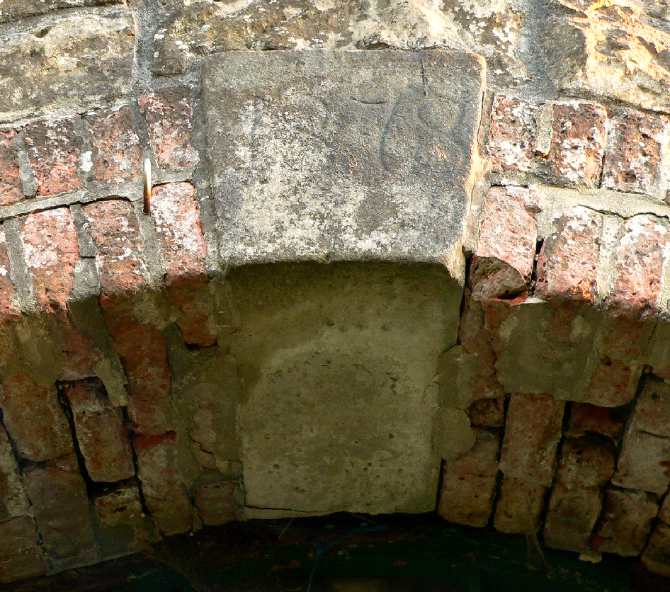 Struckmeyersche Mühle